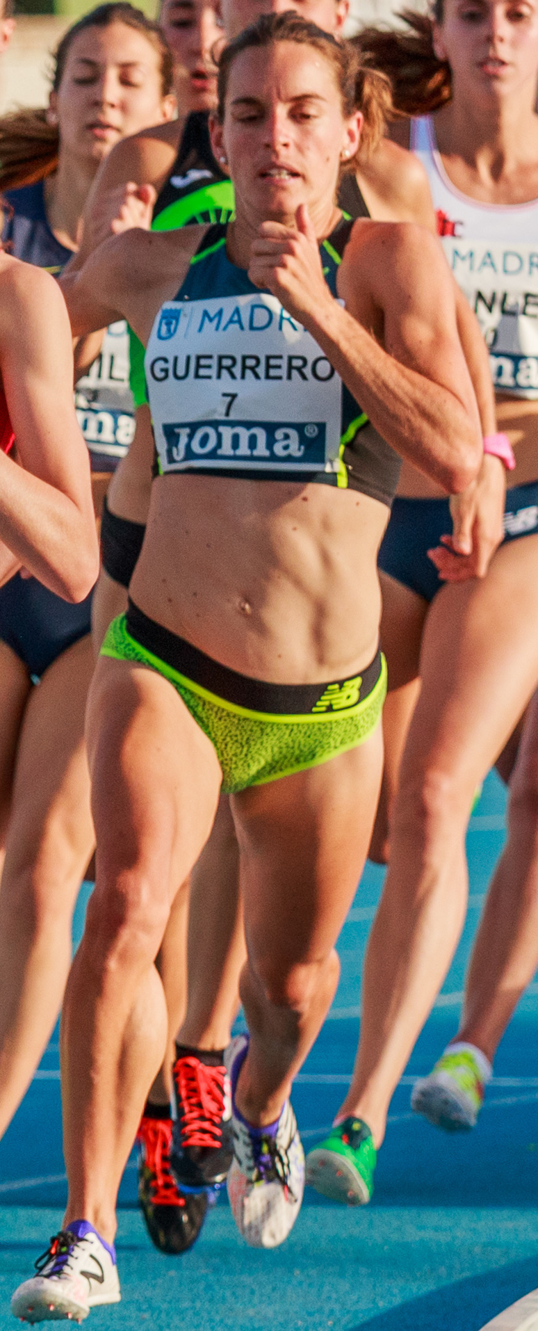 Esther Guerrero (ESP). 800m. IAAF World Challenge. Meeting Madrid 2017. Moratalaz, Madrid.